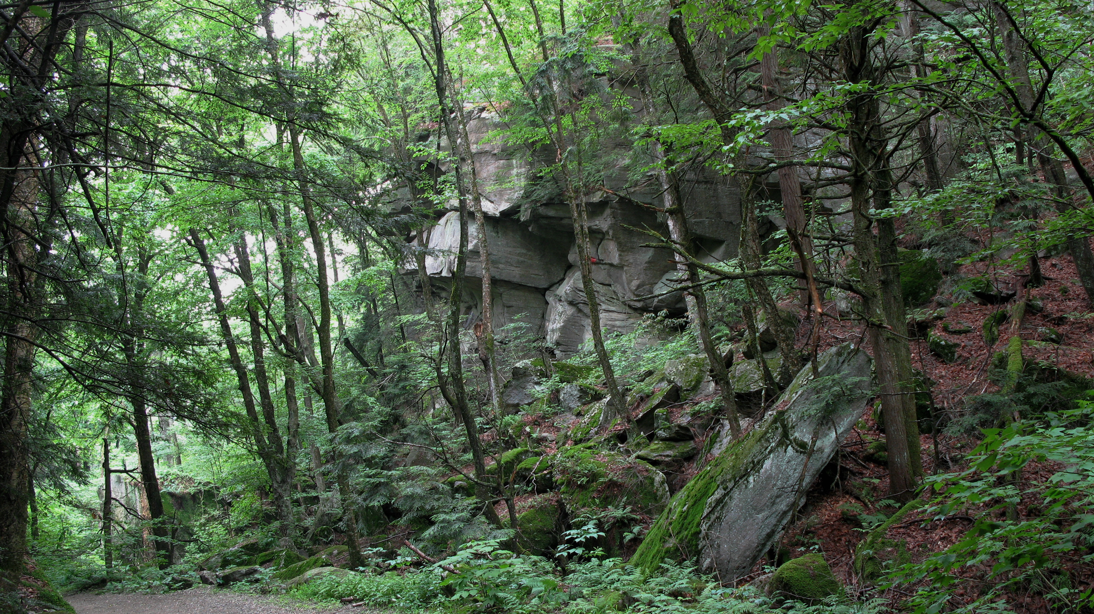 Rattlesnake Gutter, in Leverett, Massachusetts.